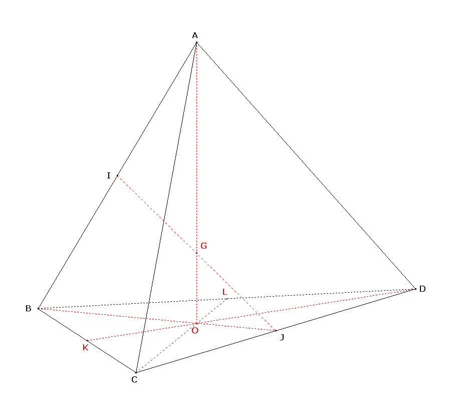 Position de l'isobarycentre d'un tétraèdre.